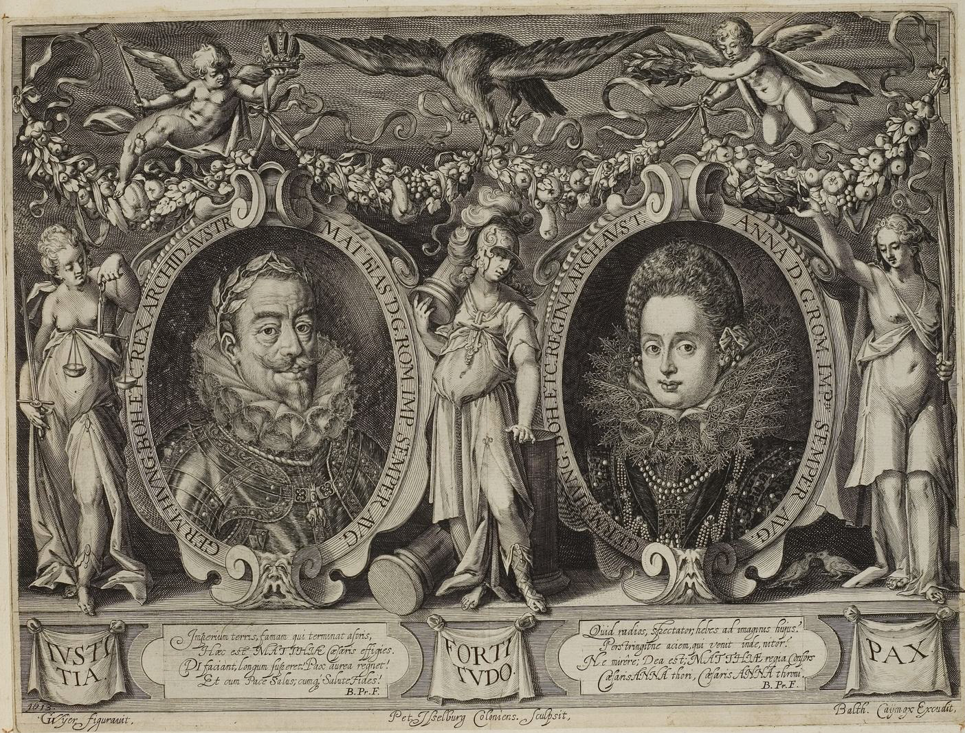 Grafik aus dem Klebeband Nr. 1 der Fürstlich Waldeckschen Hofbibliothek Arolsen Motiv: Kaiser Matthias und Kaiserin Anna